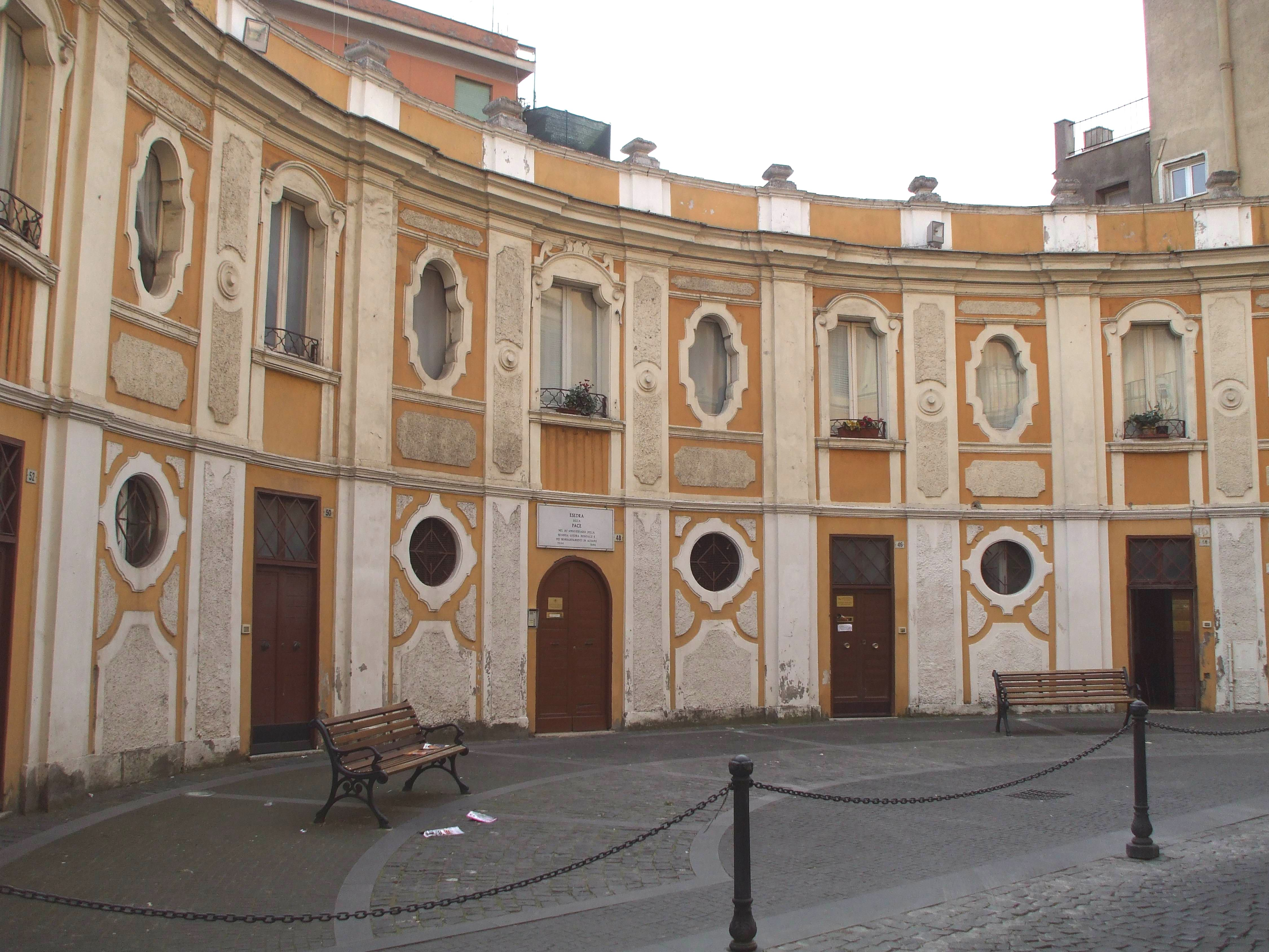 Albano Laziale - Il Corso di sopra - l'Esedra